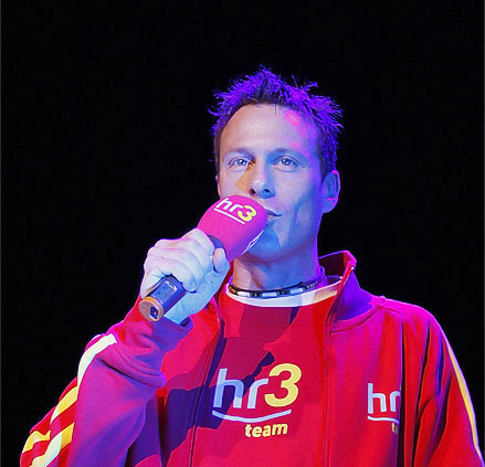 Jens Schulenburg, hr3